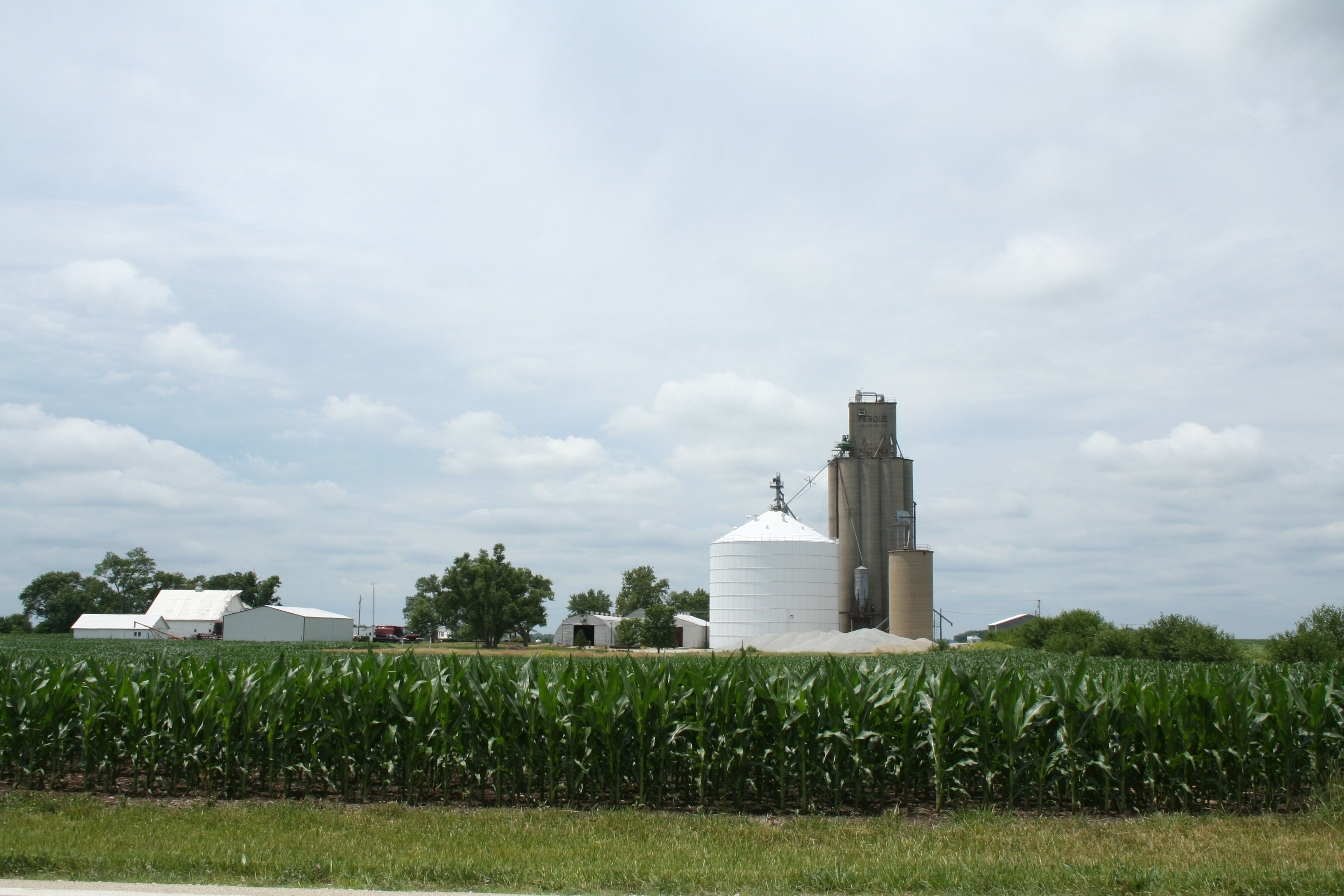 Perdueville_Illinois_grain_elevator